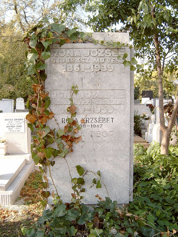 Róna József (Lovasberény, 1861. febr. 1. – Bp., 1939. dec. 31.) szobrász sírja Budapesten. Kozma utcai izraelita temető: 3C-11-19.